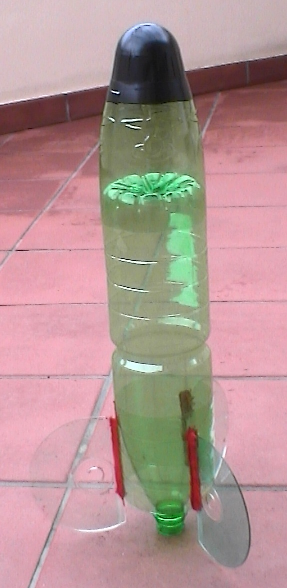 Razzo ad Acqua completo di Pinne e Ogiva, Water Rocket, Fusee ad Aue